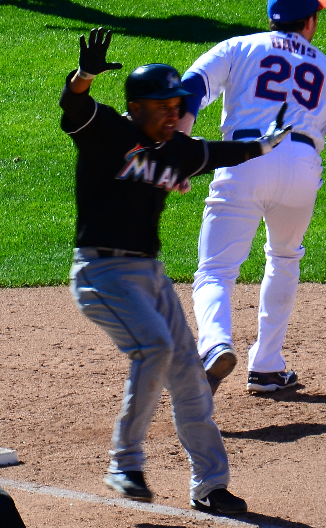 Plácido Polanco